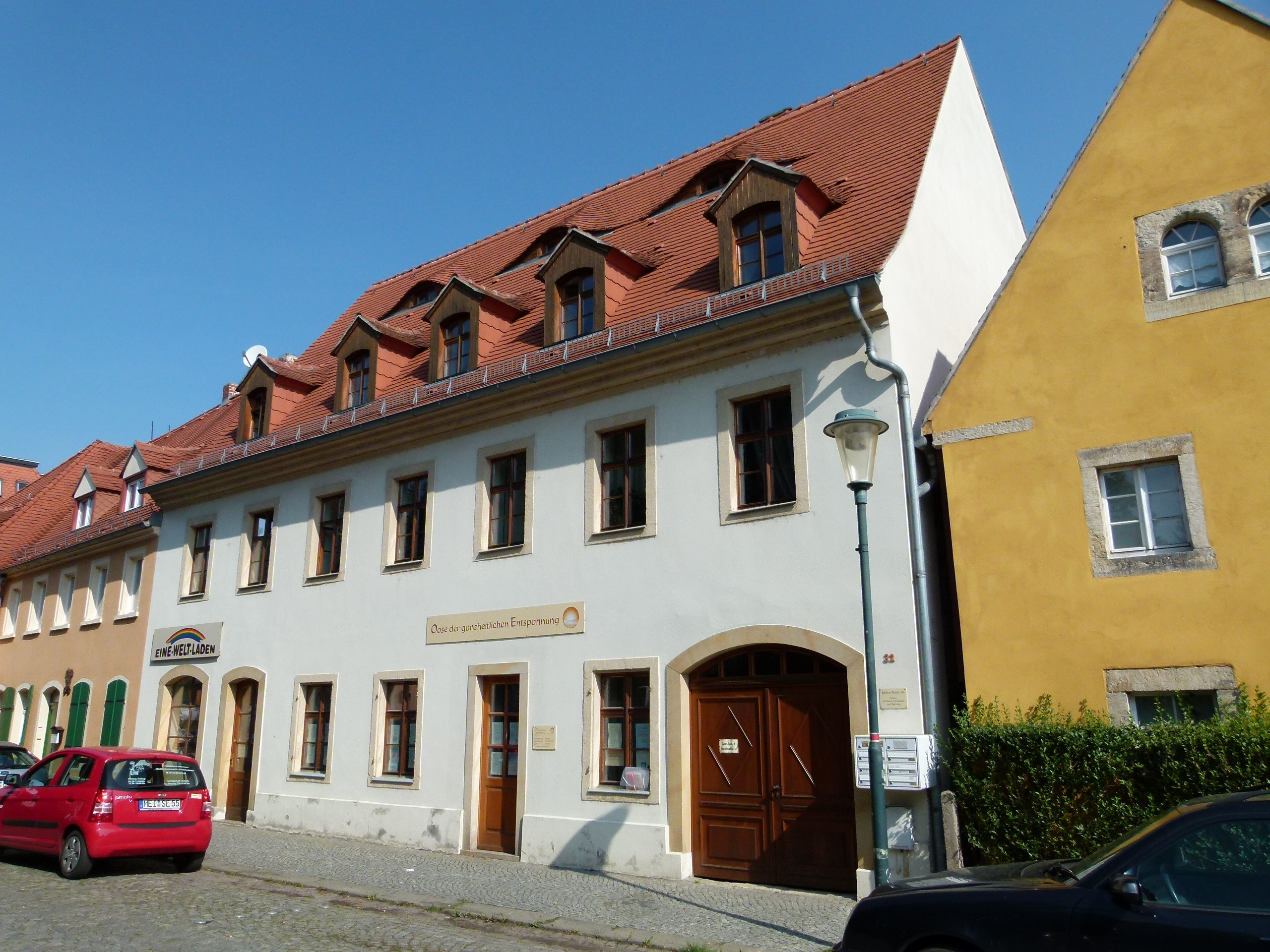 Denkmalgeschütztes Haus, Altkötzschenbroda 32, Radebeul, Sachsen